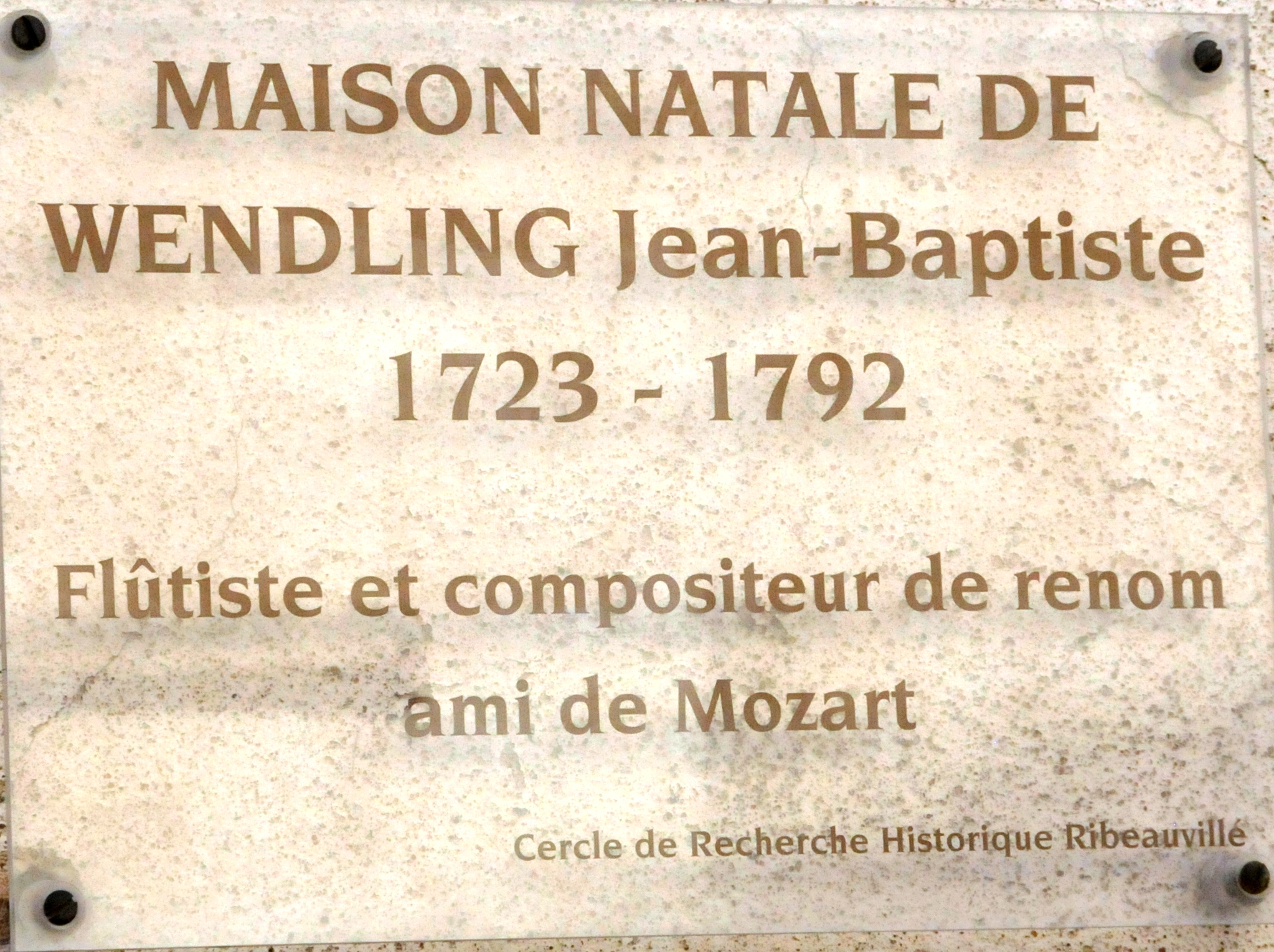 Tafel am Geburtshaus von Johann Baptist Wendling